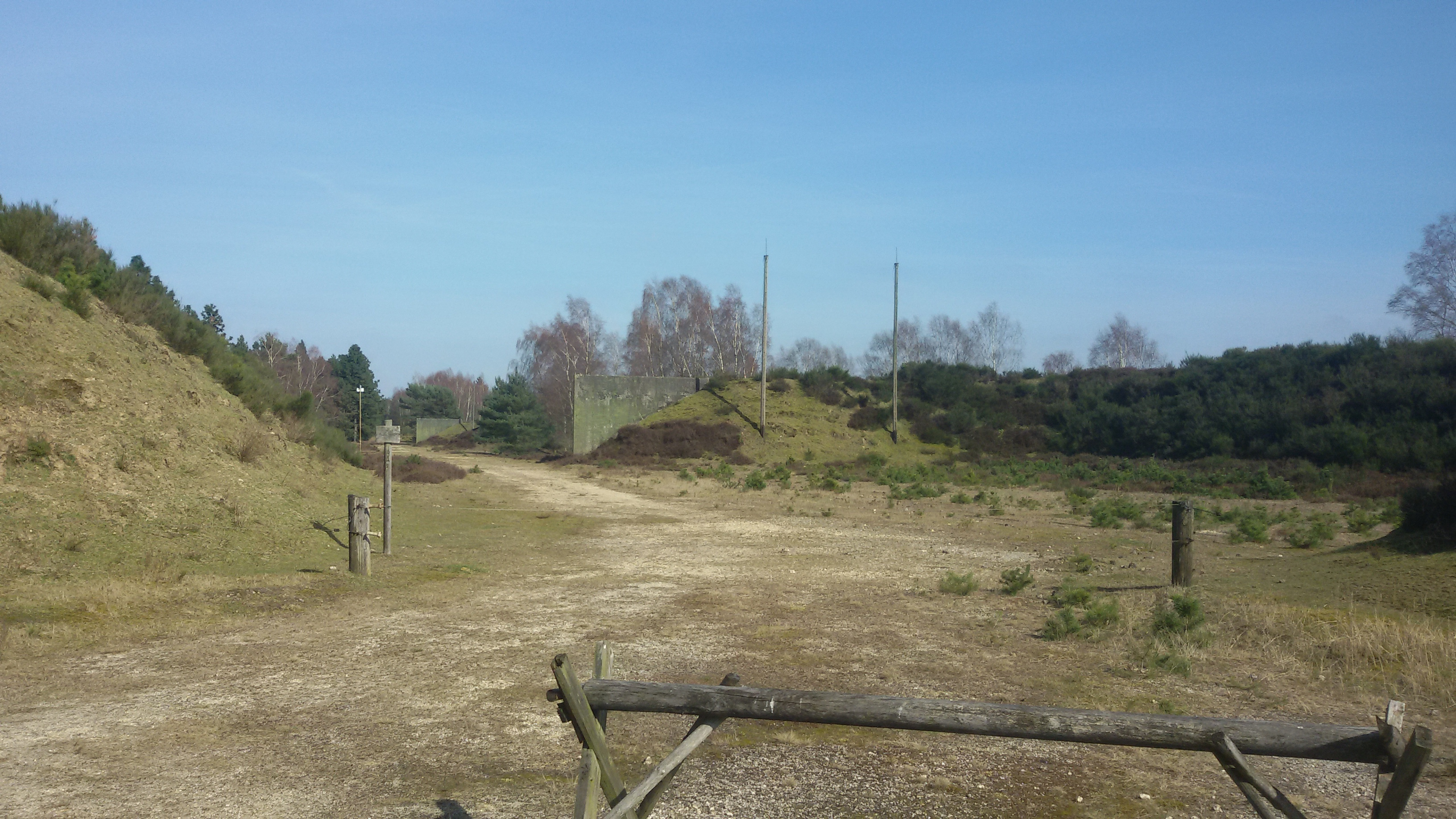 Bunkeranlagen im ehemaligen Munitionsdepot Brüggen-Bracht und die dazugehörigen Antennen und Splitterschutzwälle.